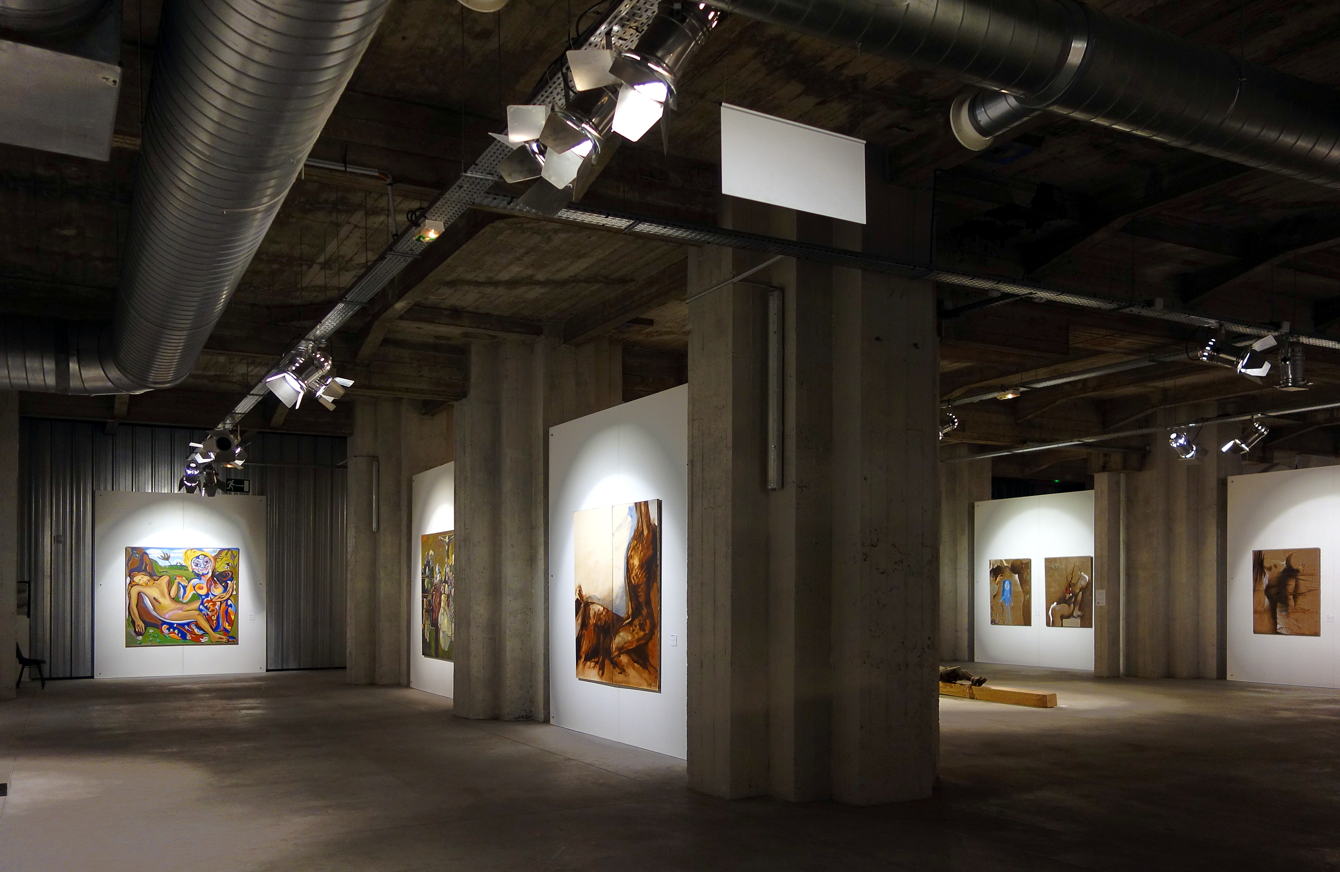 Le centre d'art sacré contemporain dans la crypte de la cathédrale Notre-Dame de la Treille à Lille. .